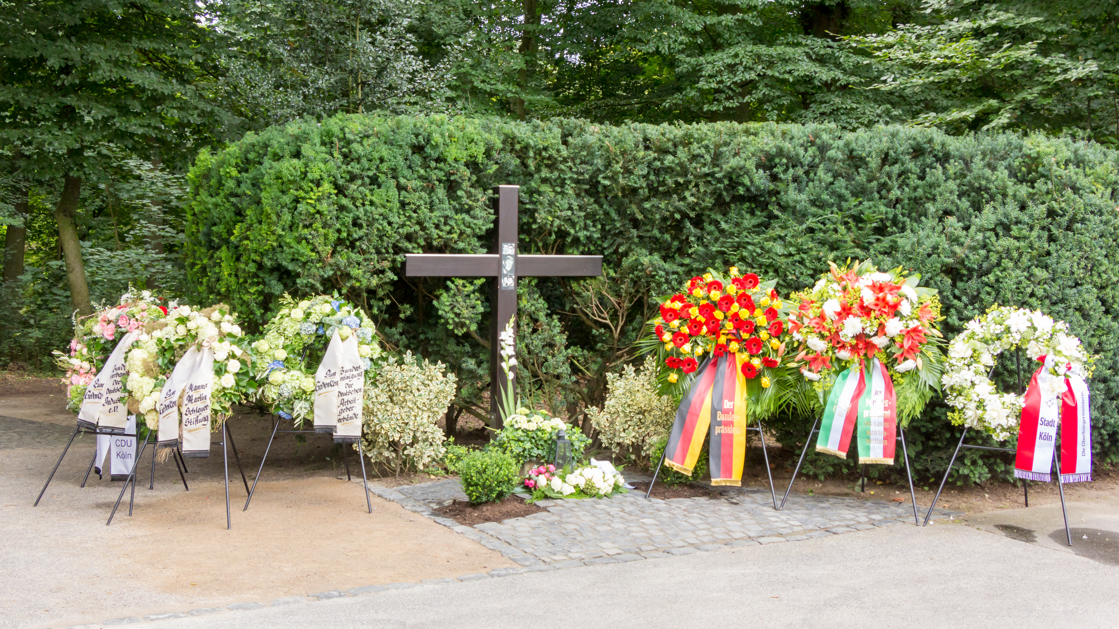 Kranzniederlegung 40. Jahrestag Attentat auf Hanns Martin Schleyer